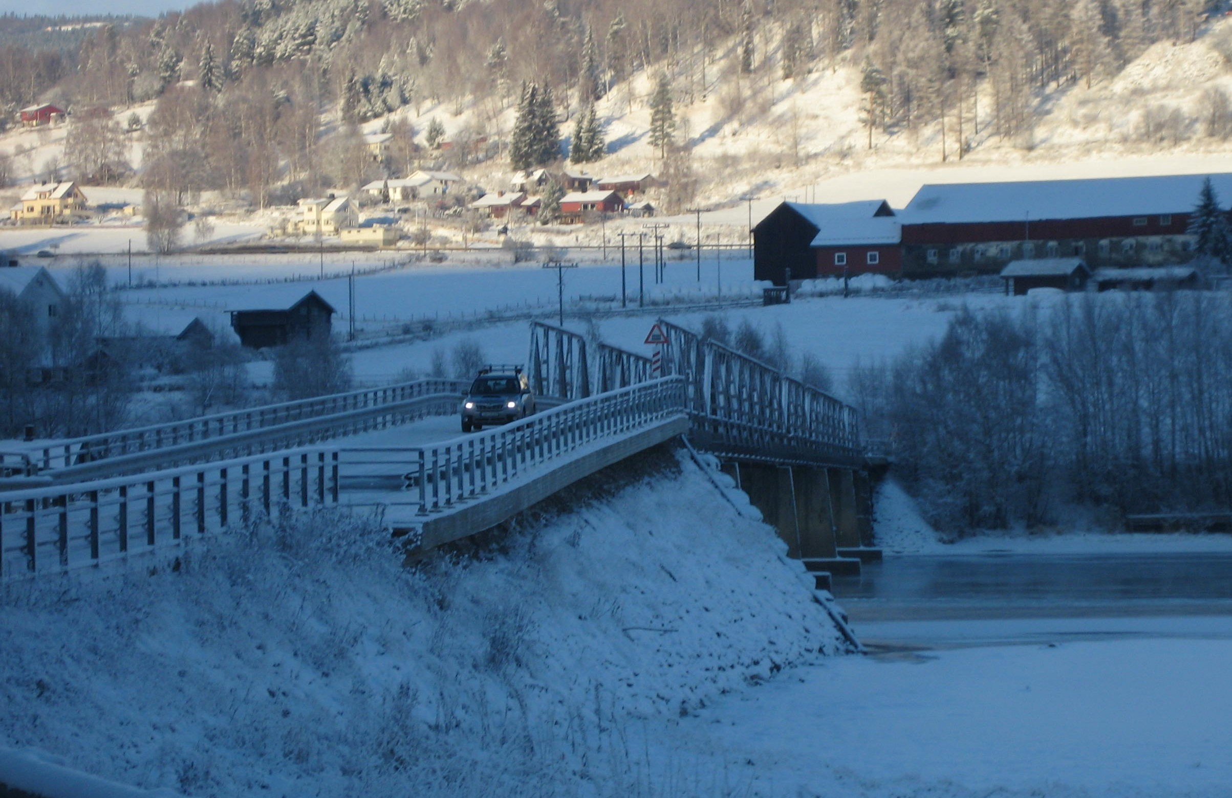 Hundorp bru